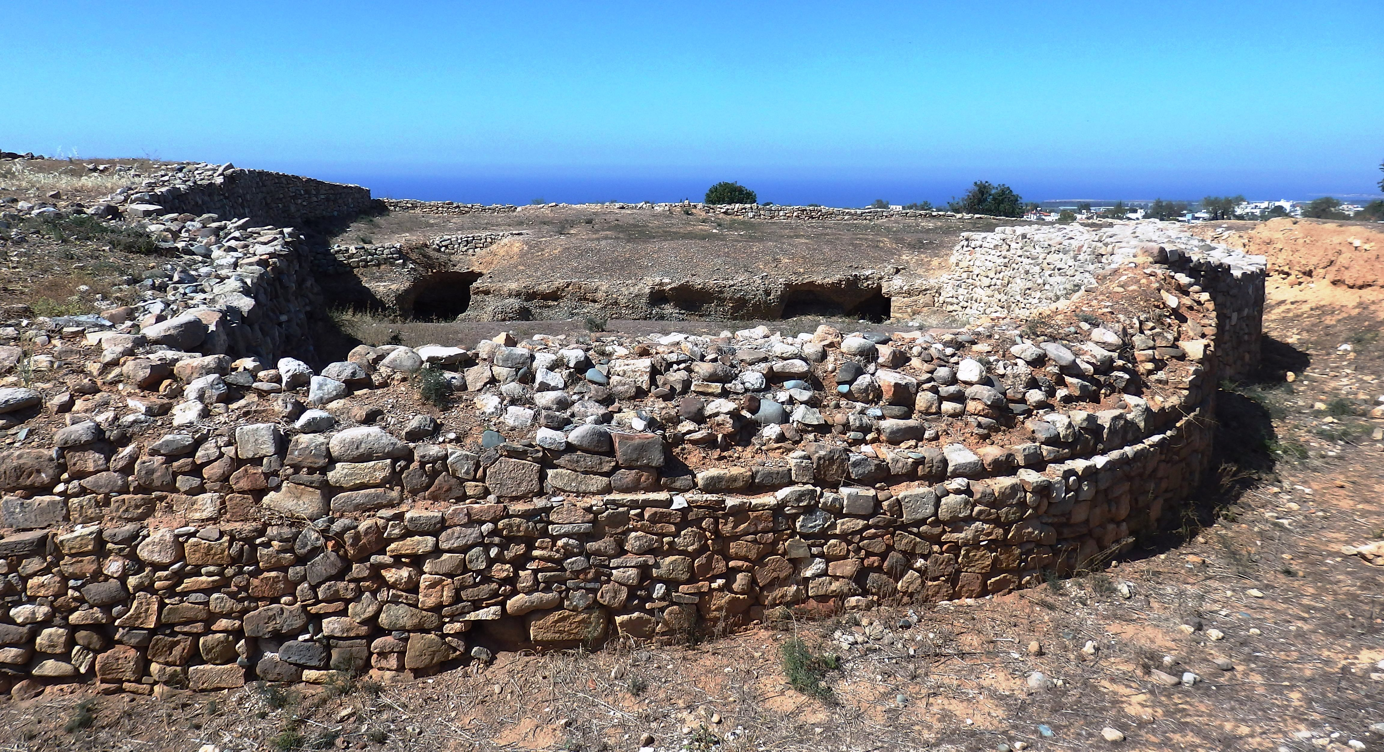 Stadtmauer beim Marcello-Hügel, Blick Richtung Süden